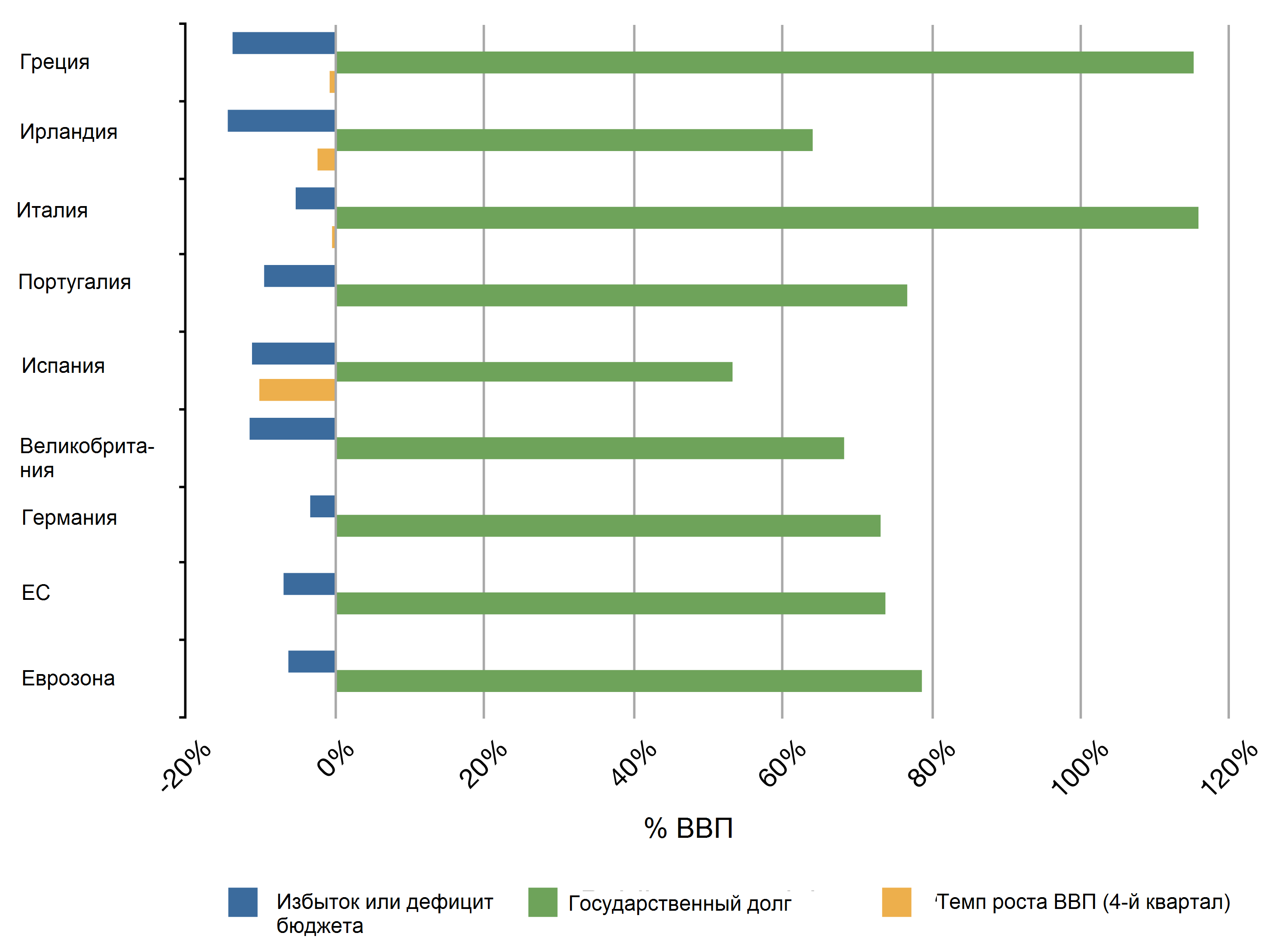 Экономические показатели Португалии, Италии, Ирландии, Греции, Великобритании, Испании, Германии, ЕС и еврозоны за 2009 г. Использованы данные Евростата: (темп роста ВВП), (темпы экономического роста Ирландии, предварительные данные).